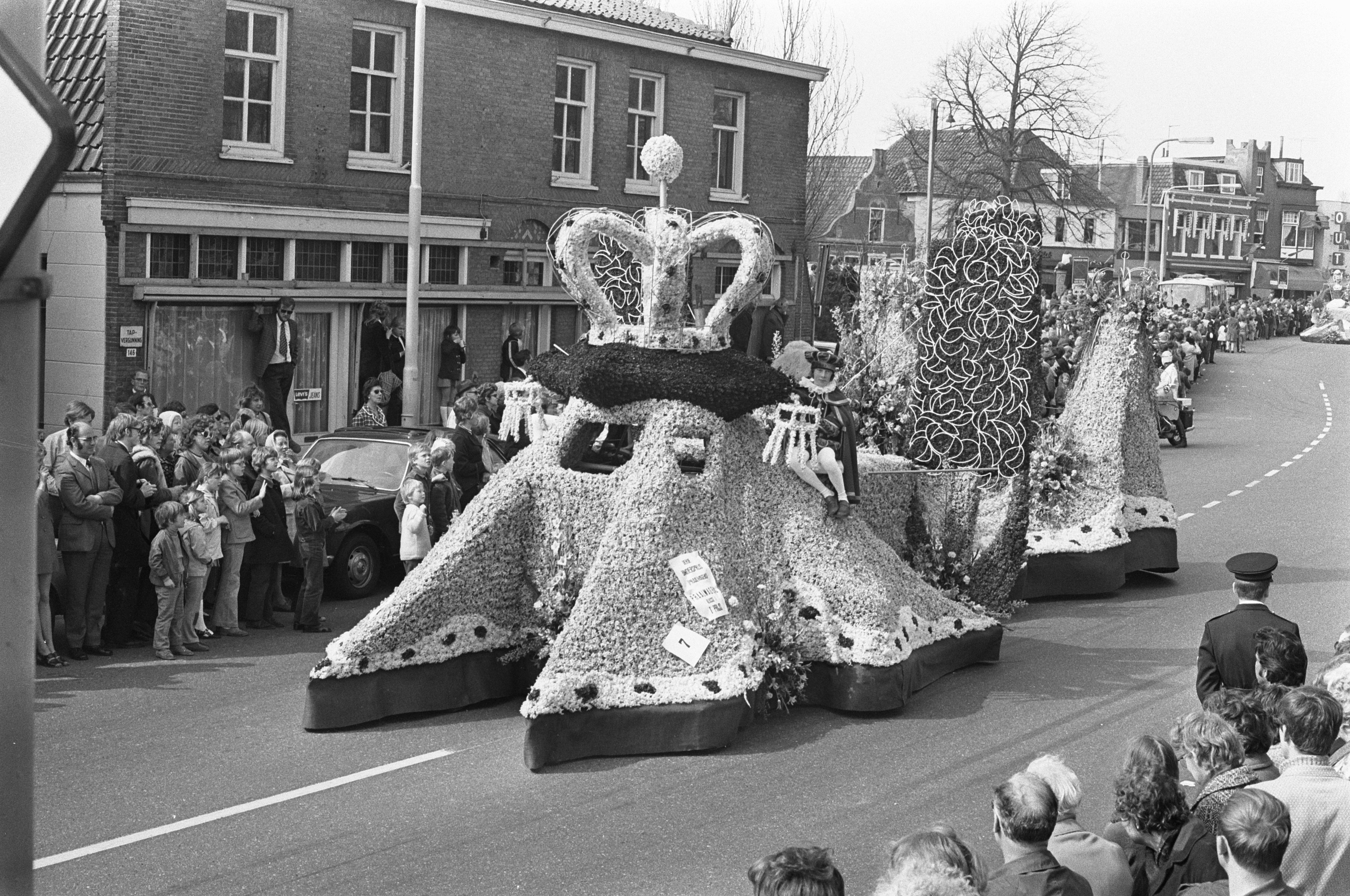 Collectie / Archief : Fotocollectie Anefo Reportage / Serie : Het jaarlijkse bloemencorso in de bollenstreek Beschrijving : Praalwagen Datum : 22 april 1972 Locatie : Zuid-Holland Trefwoorden : bloemencorsos, bollenstreek, bollenteelt Fotograaf : Punt / Anefo Auteursrechthebbende : Nationaal Archief Materiaalsoort : Negatief (zwart/wit) Nummer archiefinventaris : bekijk toegang 2.24.01.05 Bestanddeelnummer : 925-5492